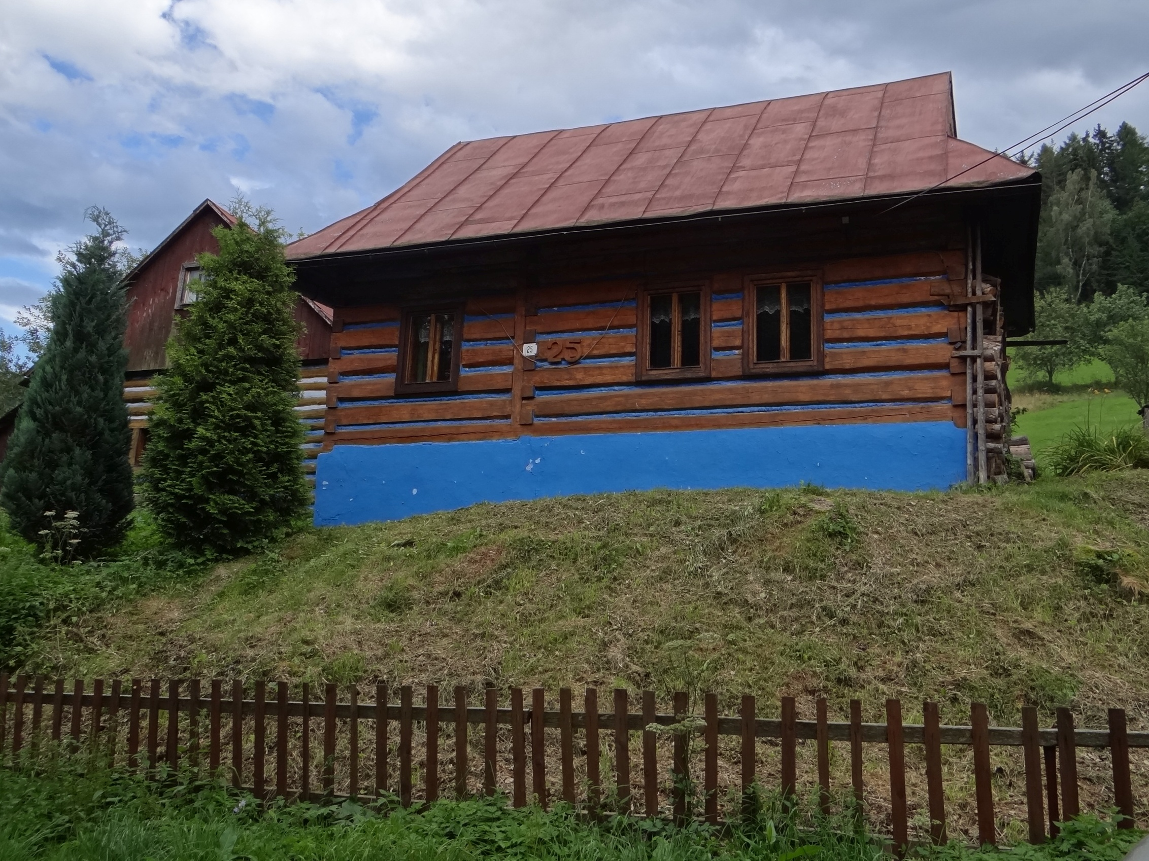 Jezersko